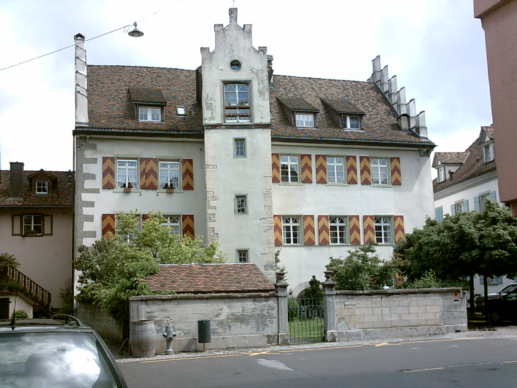 Oberhof in Diessenhofen